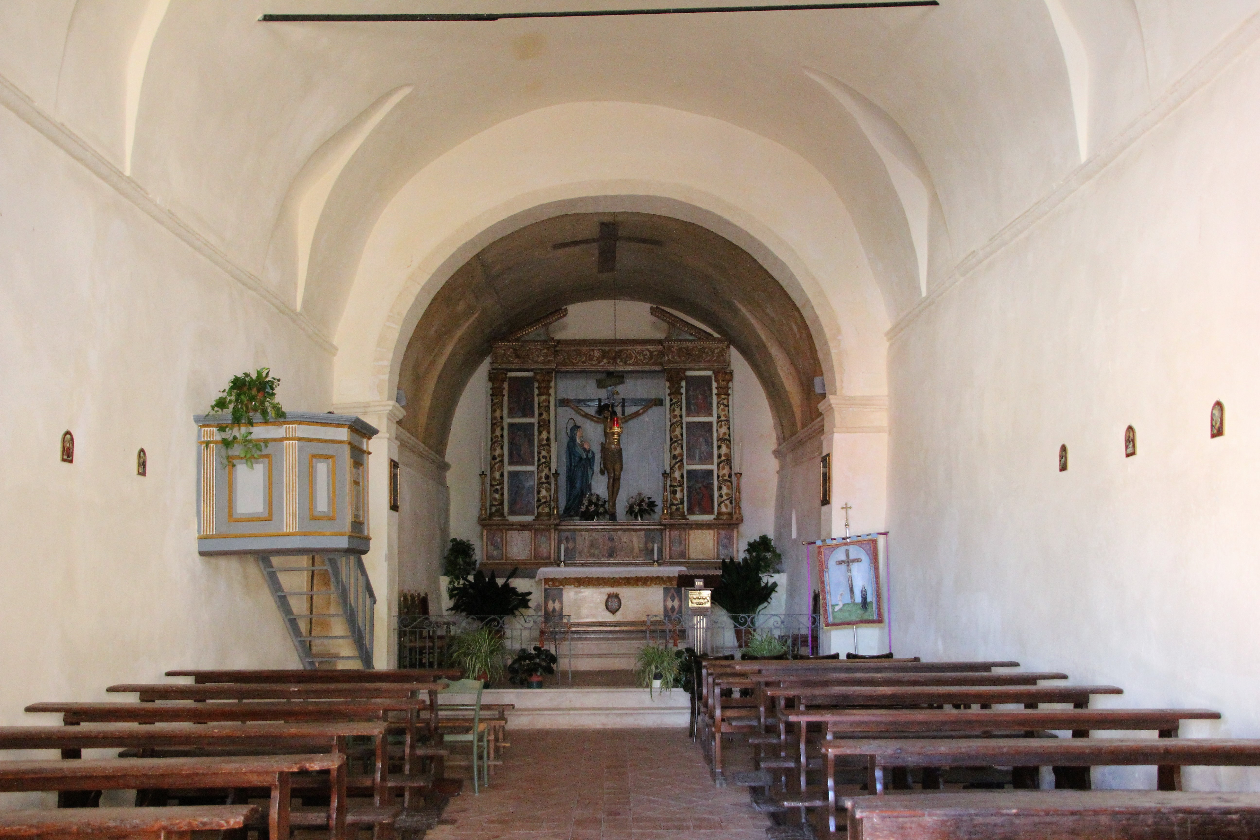 Sennori, chiesa di Santa Croce This is a photo of a monument which is part of cultural heritage of Italy.